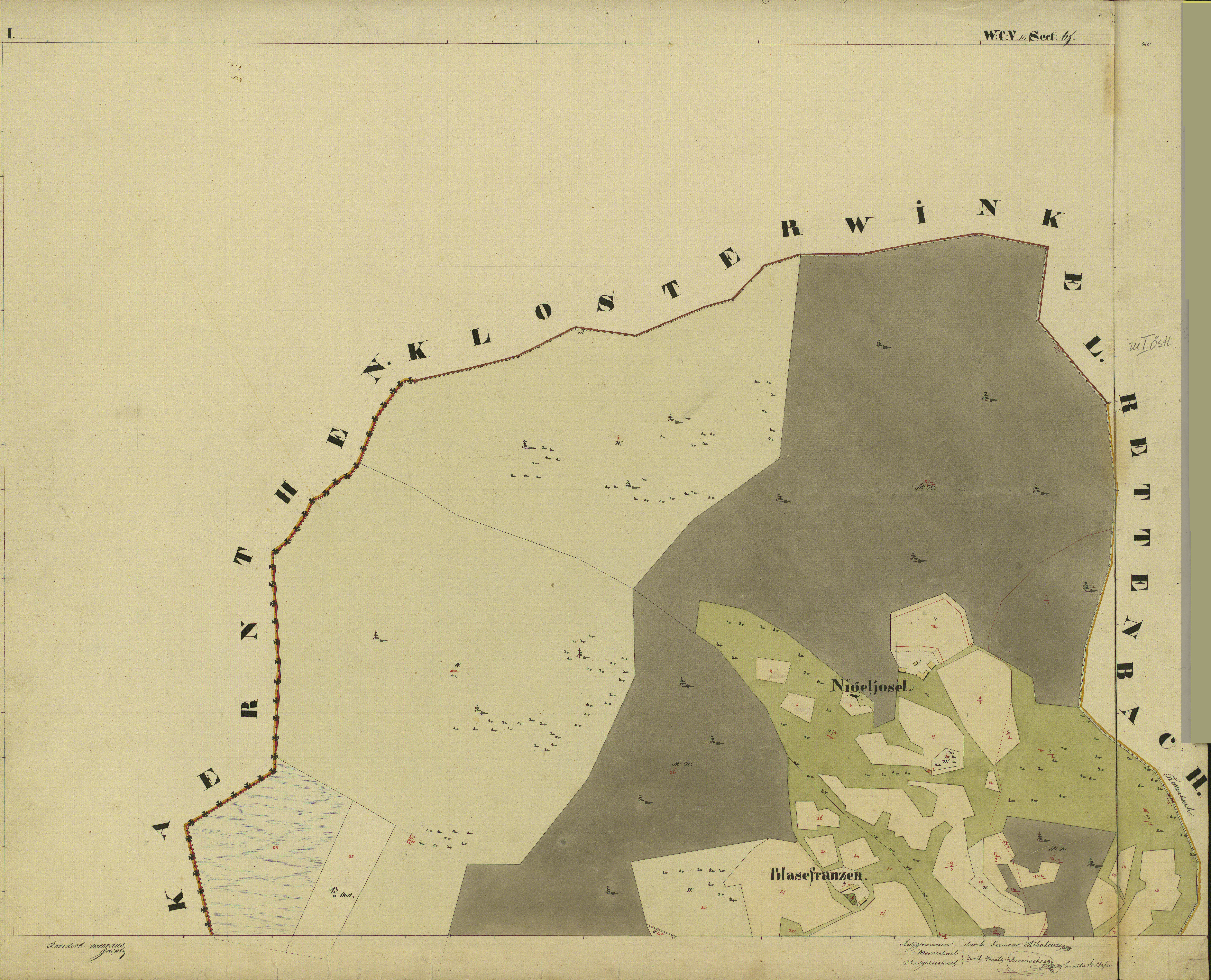 historische Vermessungskarte: österreichischer Kataster, Gemeinde Osterwitz. 1823. Blatt I Osterwitz Winkel, See Eben, Talschluss des Rettenbachtales